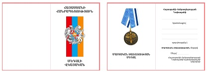 Մարտական ծառայության մեդալի վկայական